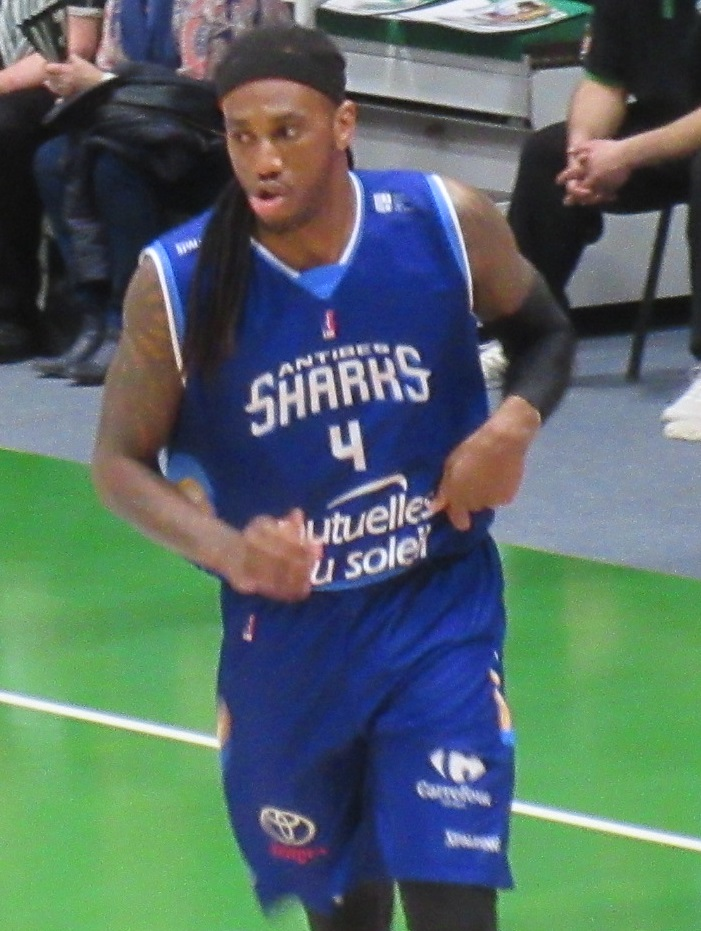 Tim Blue avec le maillot d'Antibes